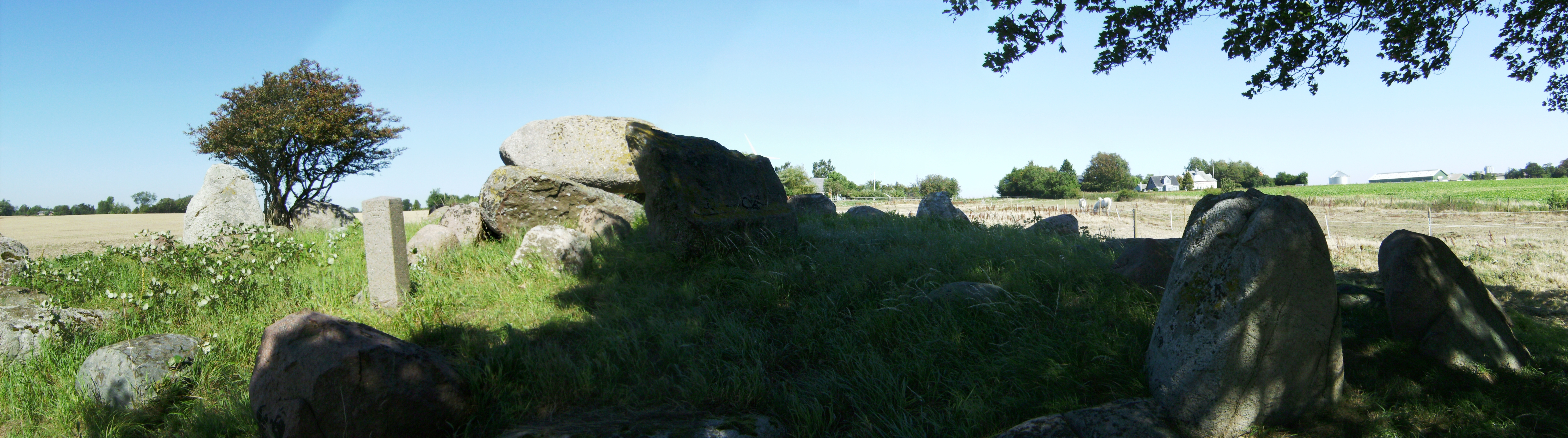 En langdysse på Vantorevej i Nysted. A dolmen in Nysted, Denmark